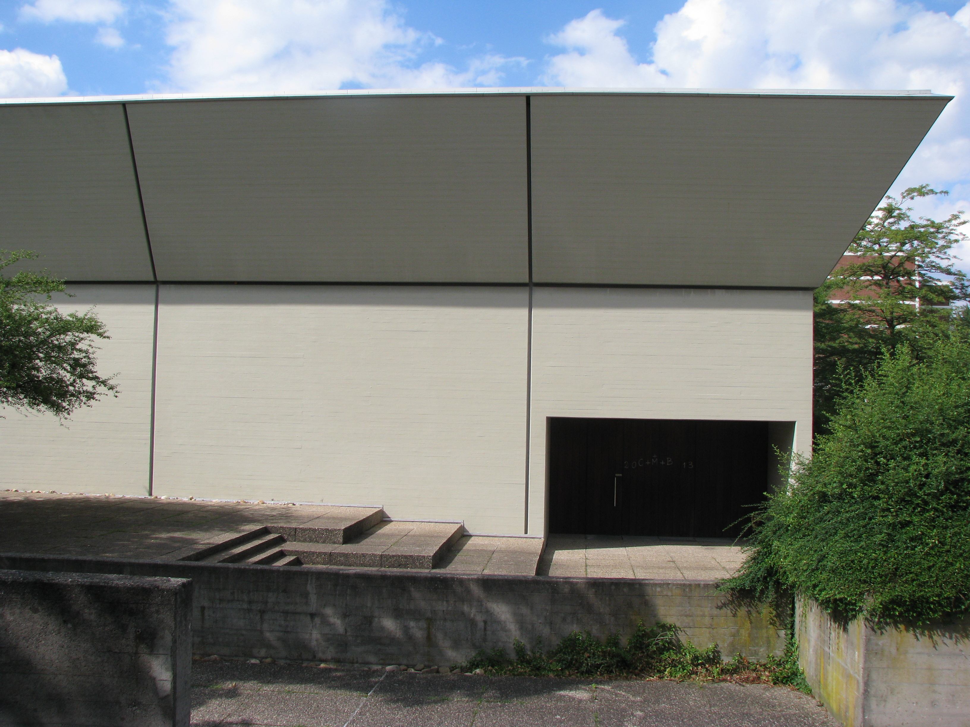 Katholische Pfarrkirche St. Paul Heidelberg-Boxberg: Südseite mit Eingang. Erbaut 1970-72, Architekt: Lothar Götz